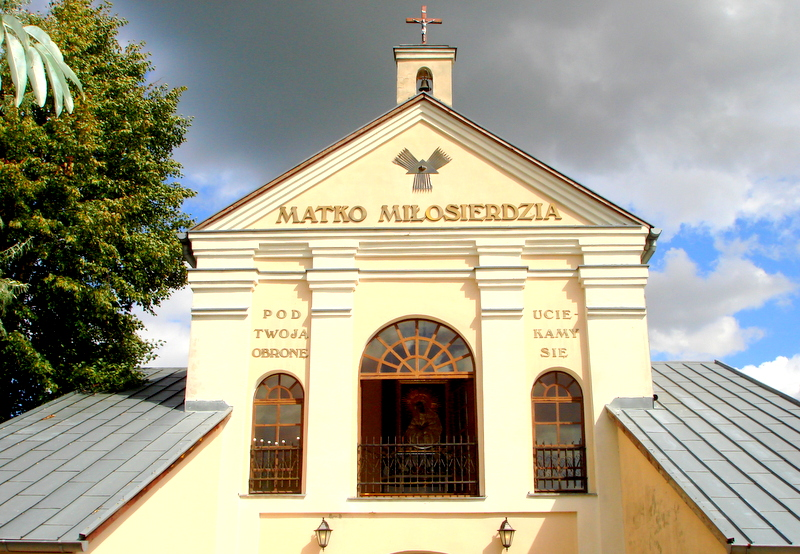 Rokitno, kaplica Matki Bożej Ostrobramskiej